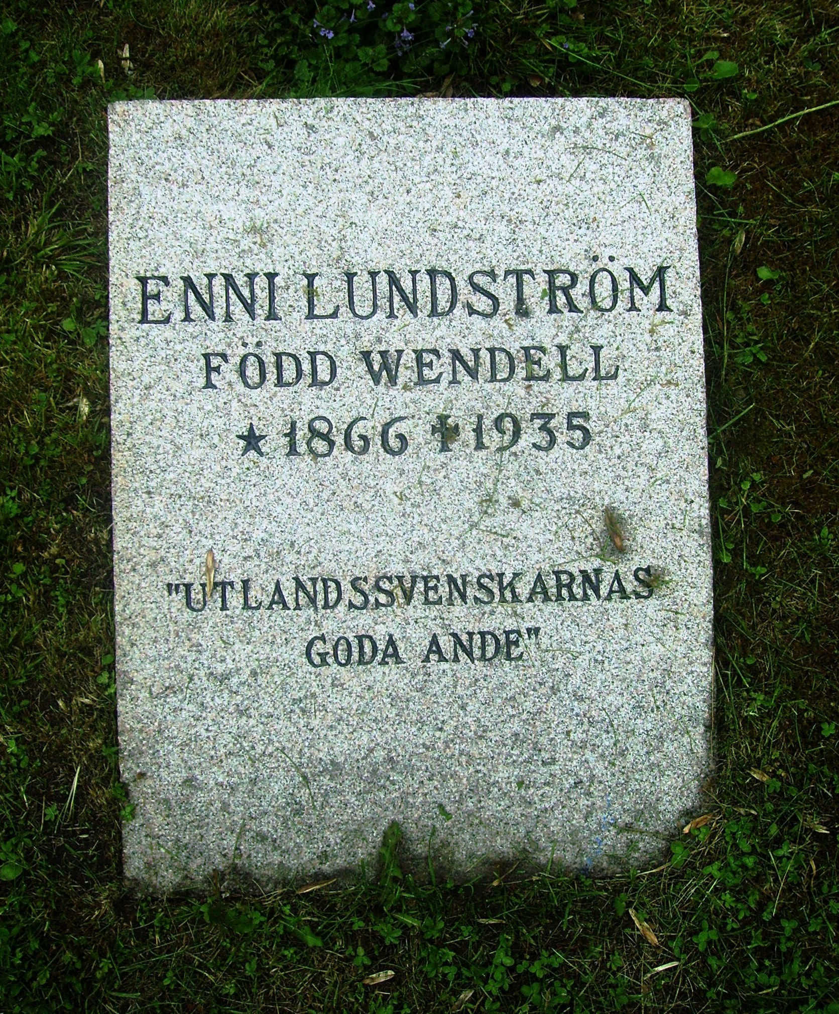 Picture of Enni Lundström's grave at Sigtuna kyrkogård in Uppland.